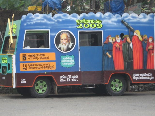 കേരളാ ശാസ്ത്രസാഹിത്യ പരിഷത്ത് സംഘടിപ്പിച്ച ശാസ്ത്ര വണ്ടിയുടെ മലപ്പുറം സ്വീകരണ കേന്ദ്രത്തിൽ നിന്നും എടുത്ത ചിത്രം -റഫീക്ക് കിഴാറ്റൂർ